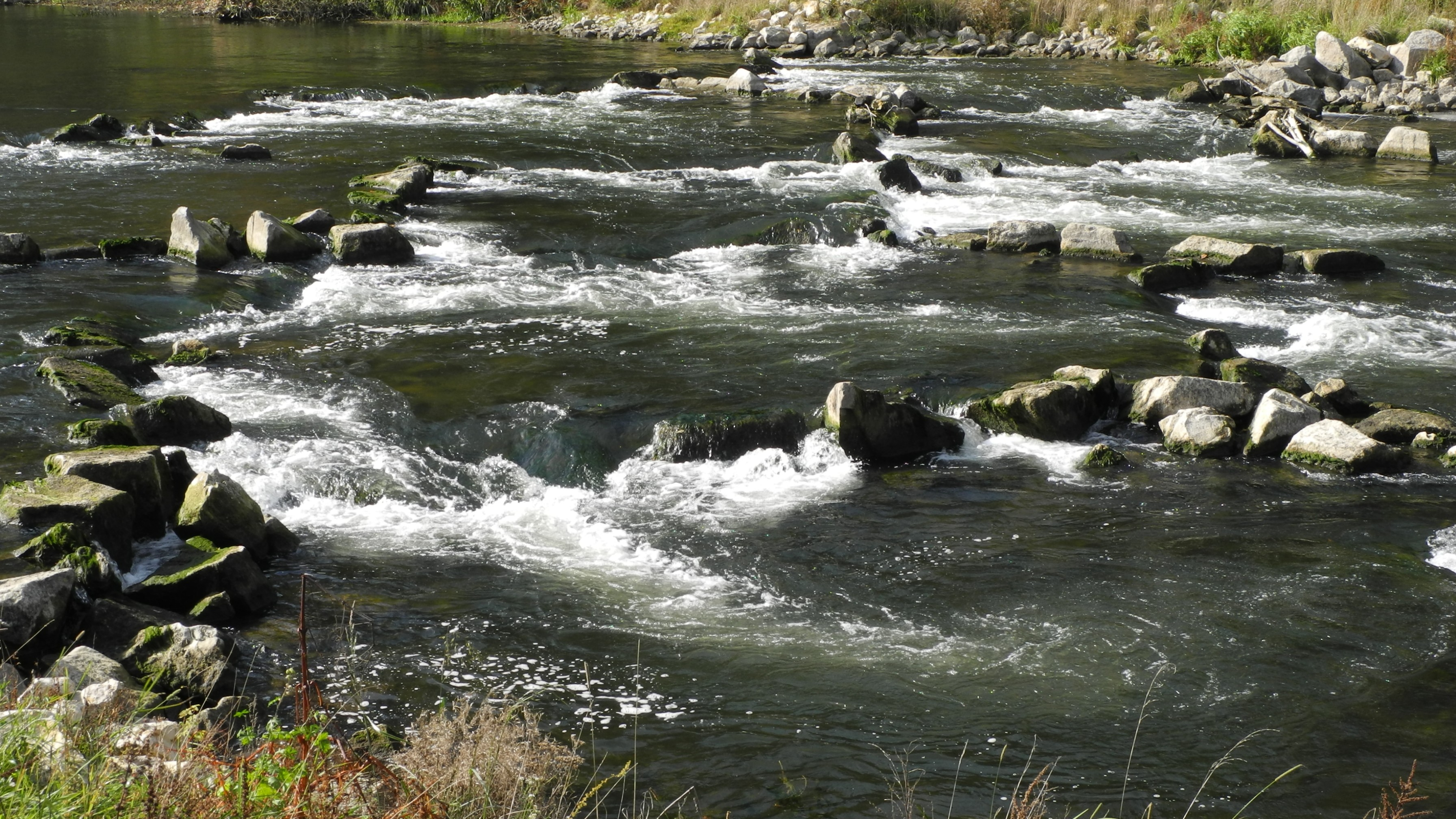 Ertingen - Riegelrampe der Donau bei Binzwangen